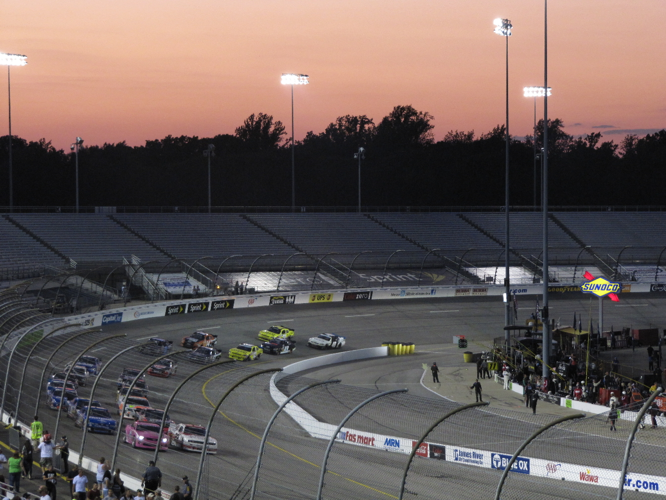 Richmond Internation Raceway Kurve 4 während des Nationwide Rennens "Virginia 529 College Savings 250" Anfang September 2011.